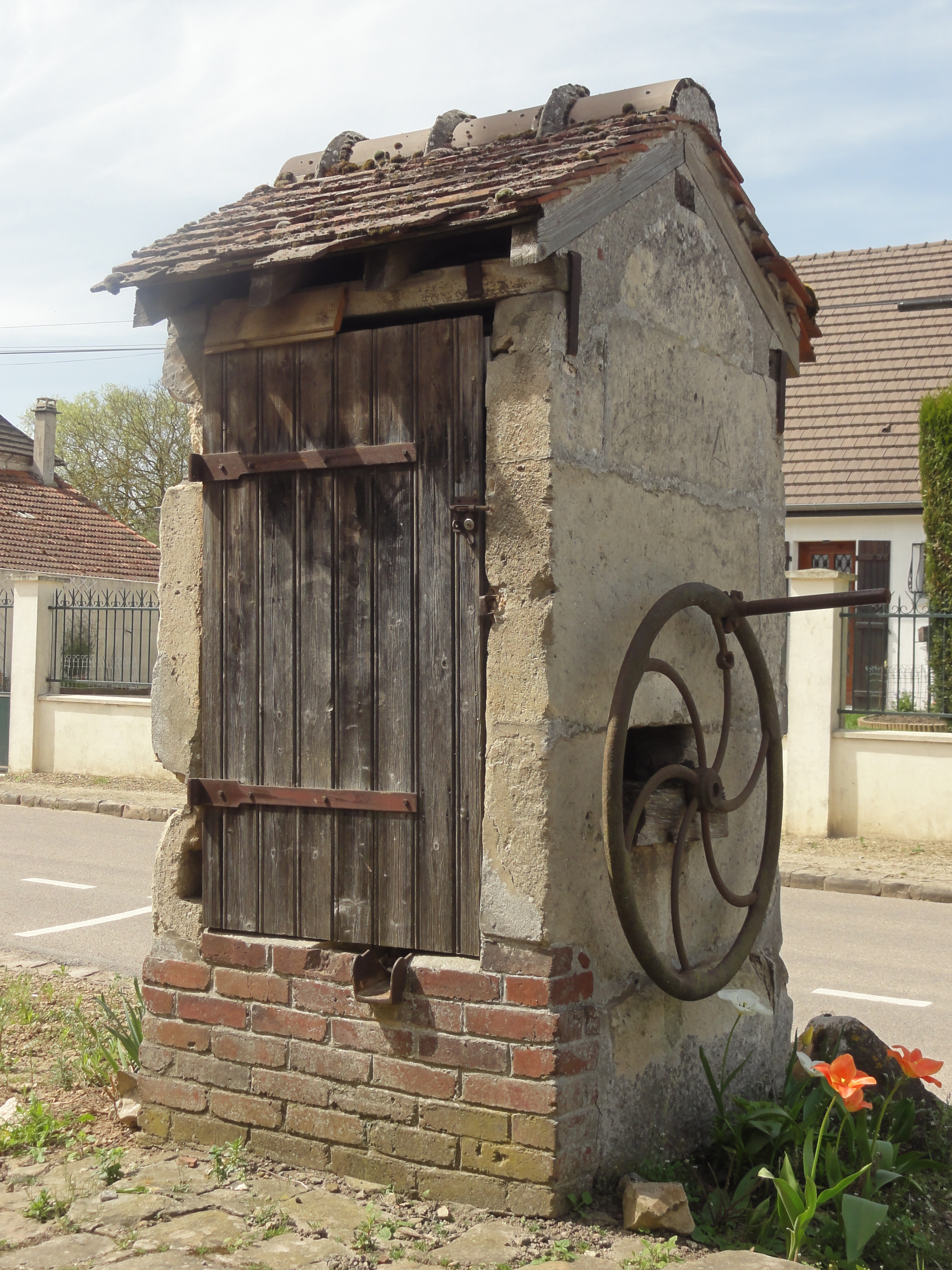 Village d'Auger-Saint-Vincent (voir titre).